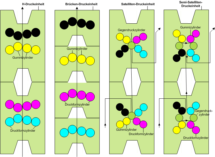 Die Abbildung zeigt verschiedene Konstruktionsarten von Zeitungsdruckmaschinen (in den Bauweisen der manroland AG). Anmerkungen:Die Veröffentlichung dieser Darstellung erfolgt in Absprache mit der manroland AG